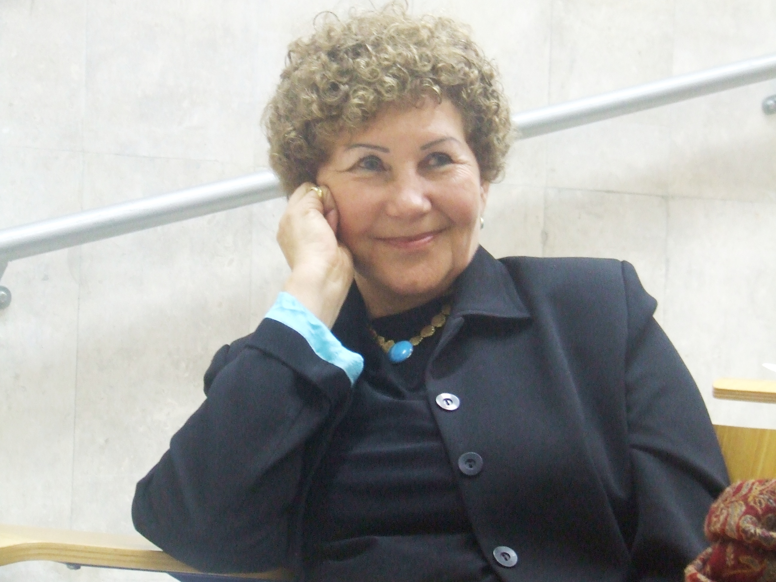 פרופ' נעמה צבר בן יהושע